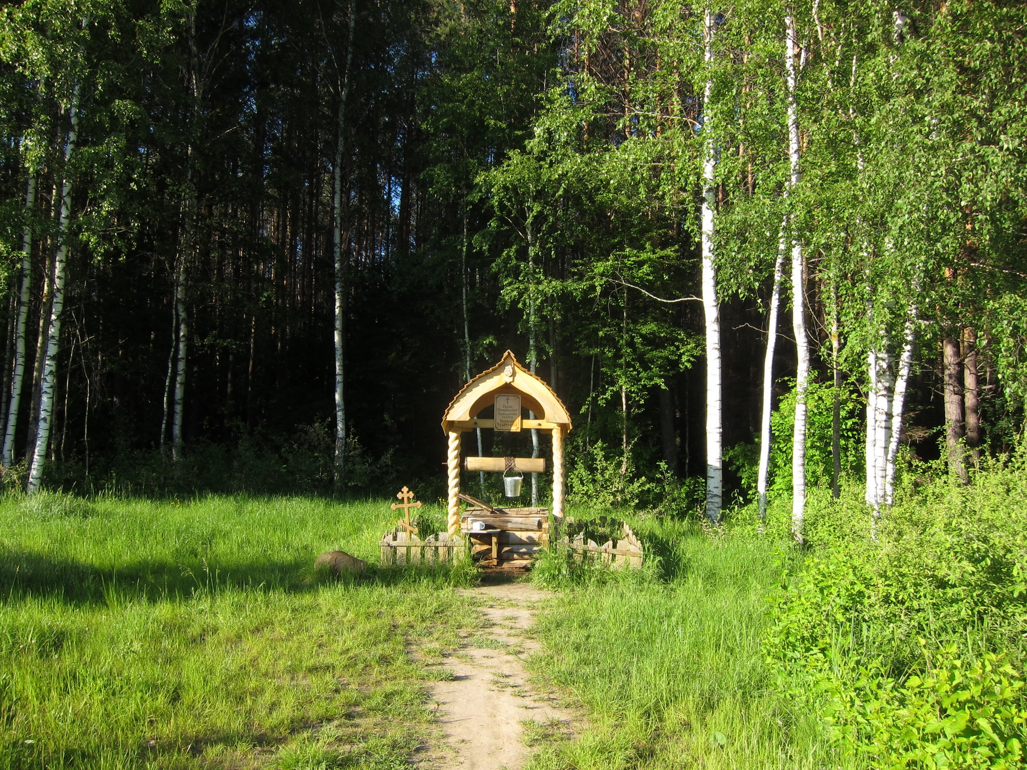 Nikolaevsky spring